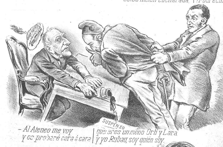 Ilustración en la revista satírica española Don Quijote.